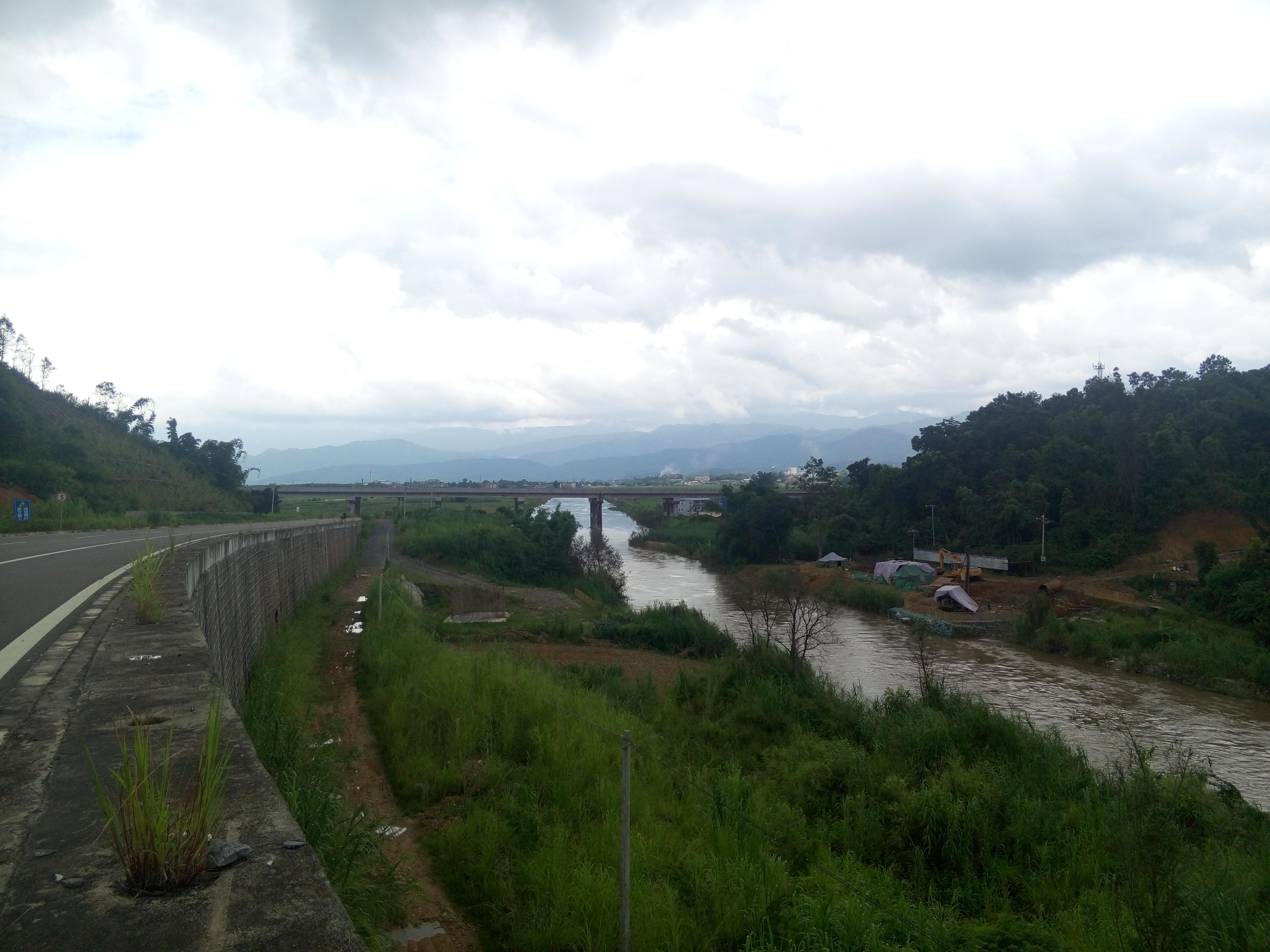 云南德宏芒市河风平段，摄于芒瑞大道与杭瑞高速相交处，图中桥梁即为杭瑞高速